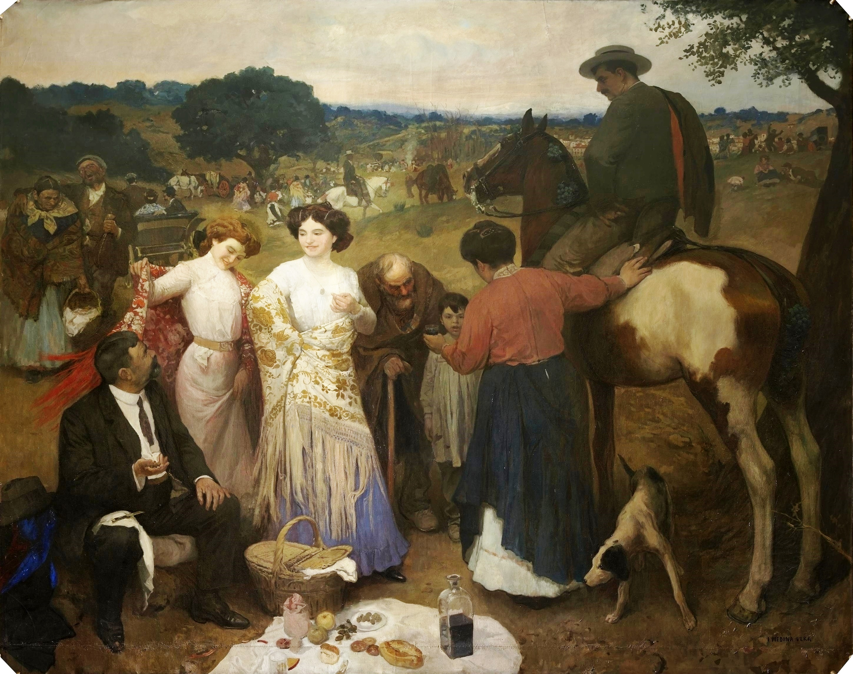 La obra representa a un grupo de romeros participando en la Romería de San Eugenio.